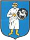 Nowe Miasto koło Nasielska, herb